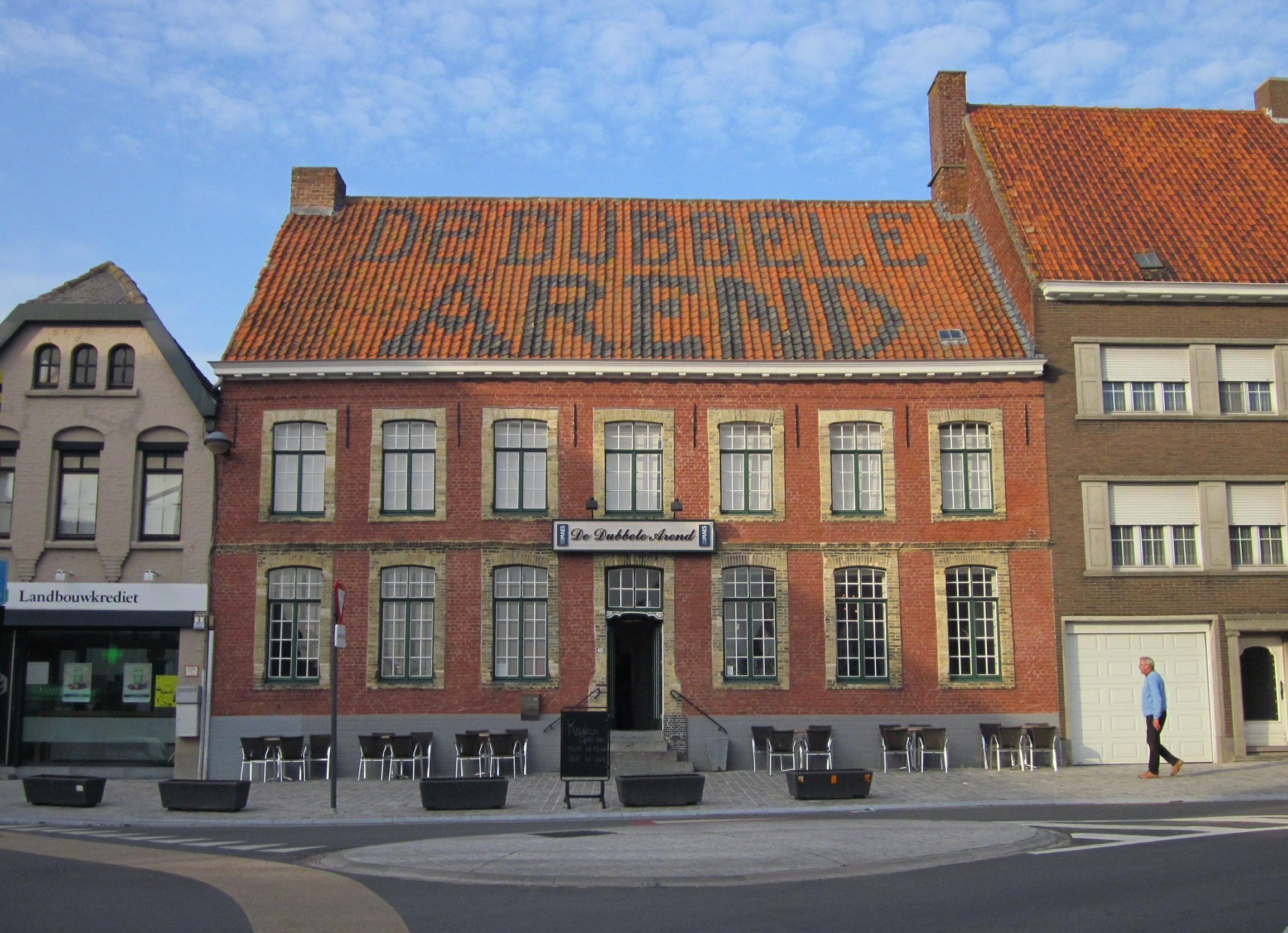 Eetcafé De Dubbele Arend in Hooglede 08″ N, 3° 04′ 53.4″ E